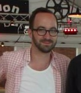 Saschka Unseld au Festival International du Film d'Animation d'Annecy le 10 juin 2013